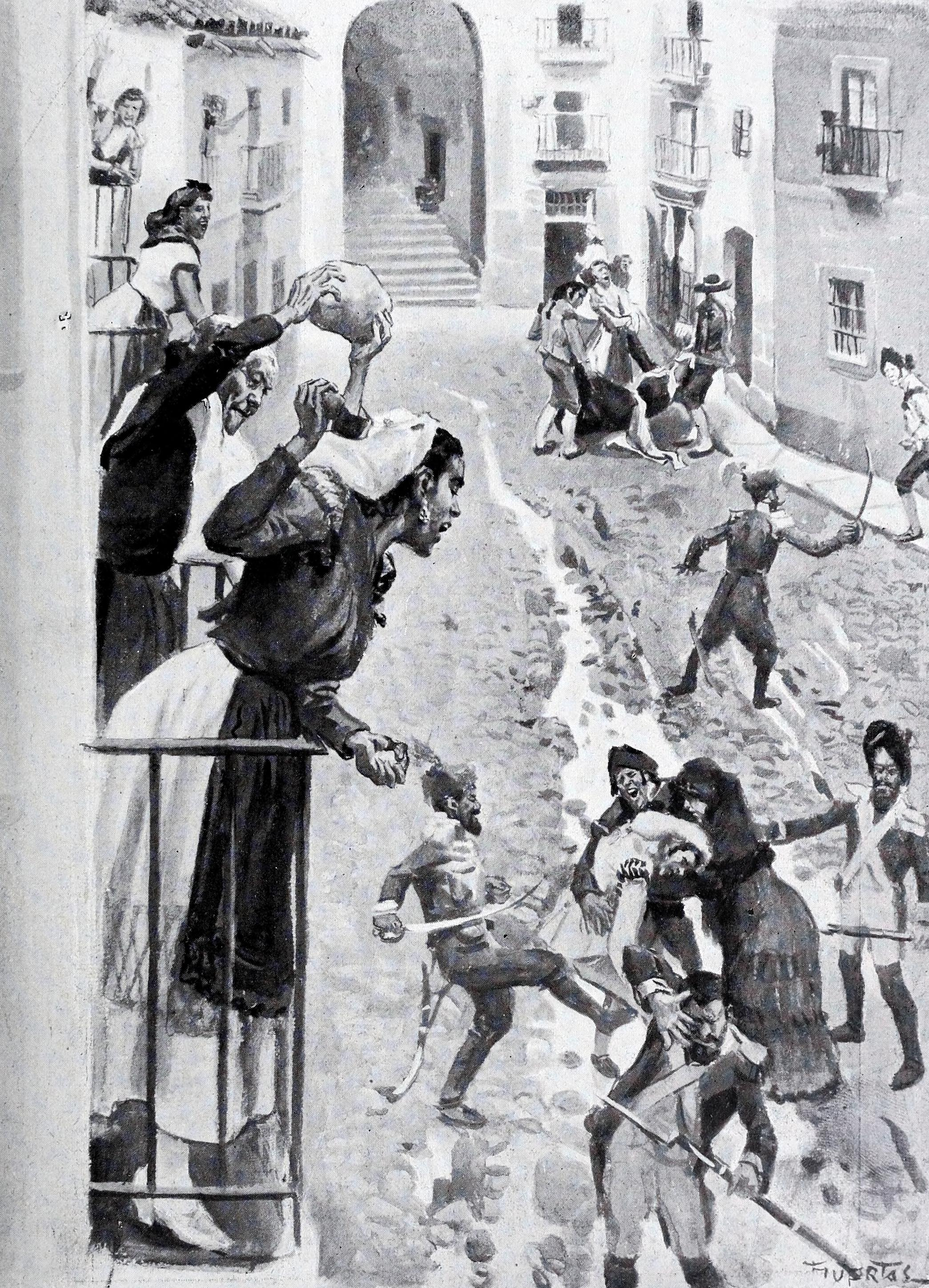 El dos de mayo de 1808 en Madrid. Escenas en la calle de Cuchilleros.